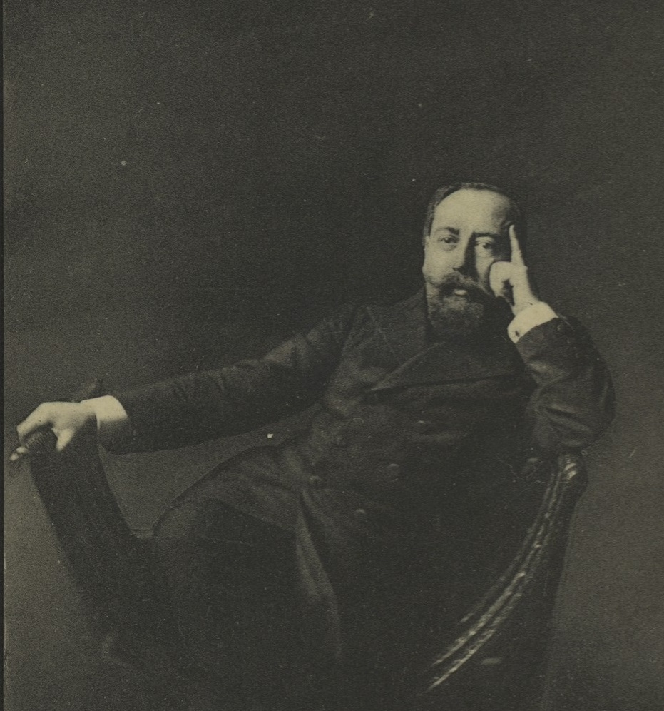 Mordecai Ehrenpreis